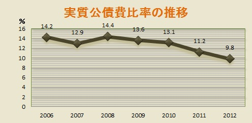 実質公債費比率の推移